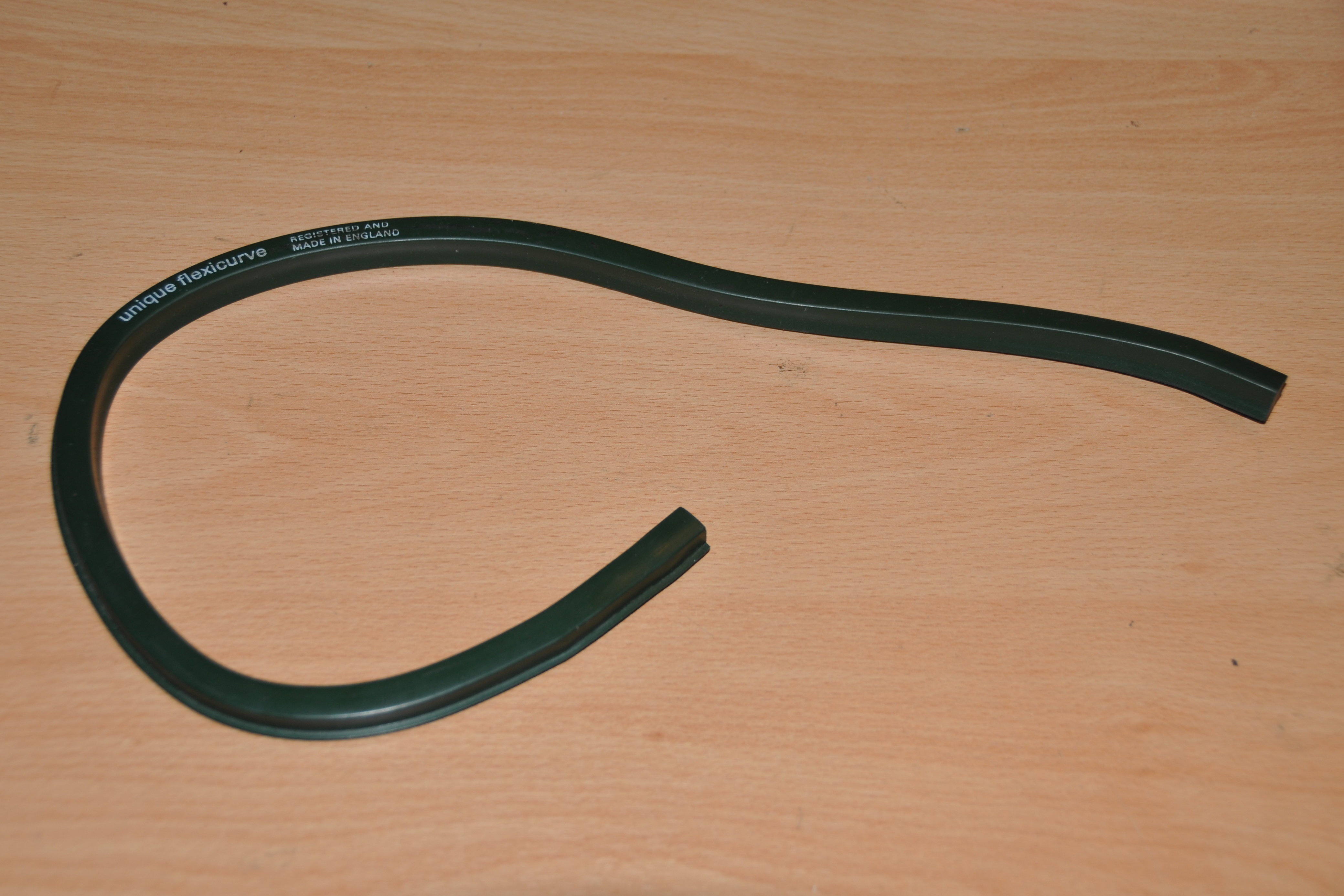 De Unique flexicurve van de Unique Slide Rule Co Ltd.